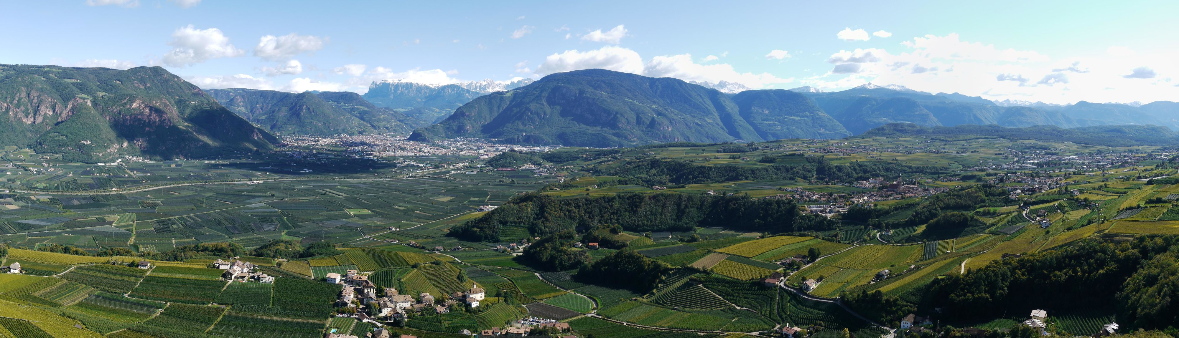 Panorama von der Ruine Boymont, Südtirol